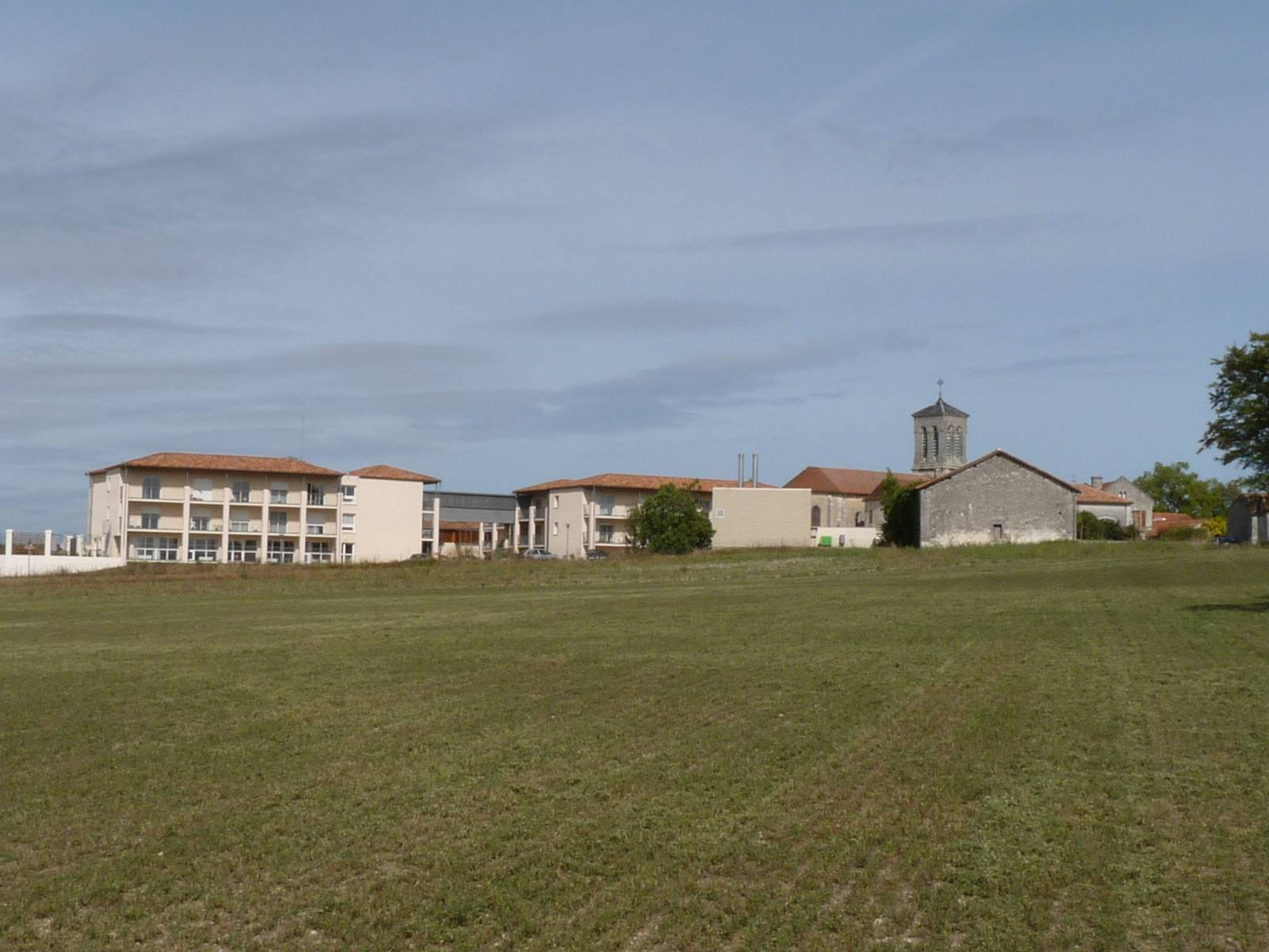 Gout-Rossignol, Dordogne, France